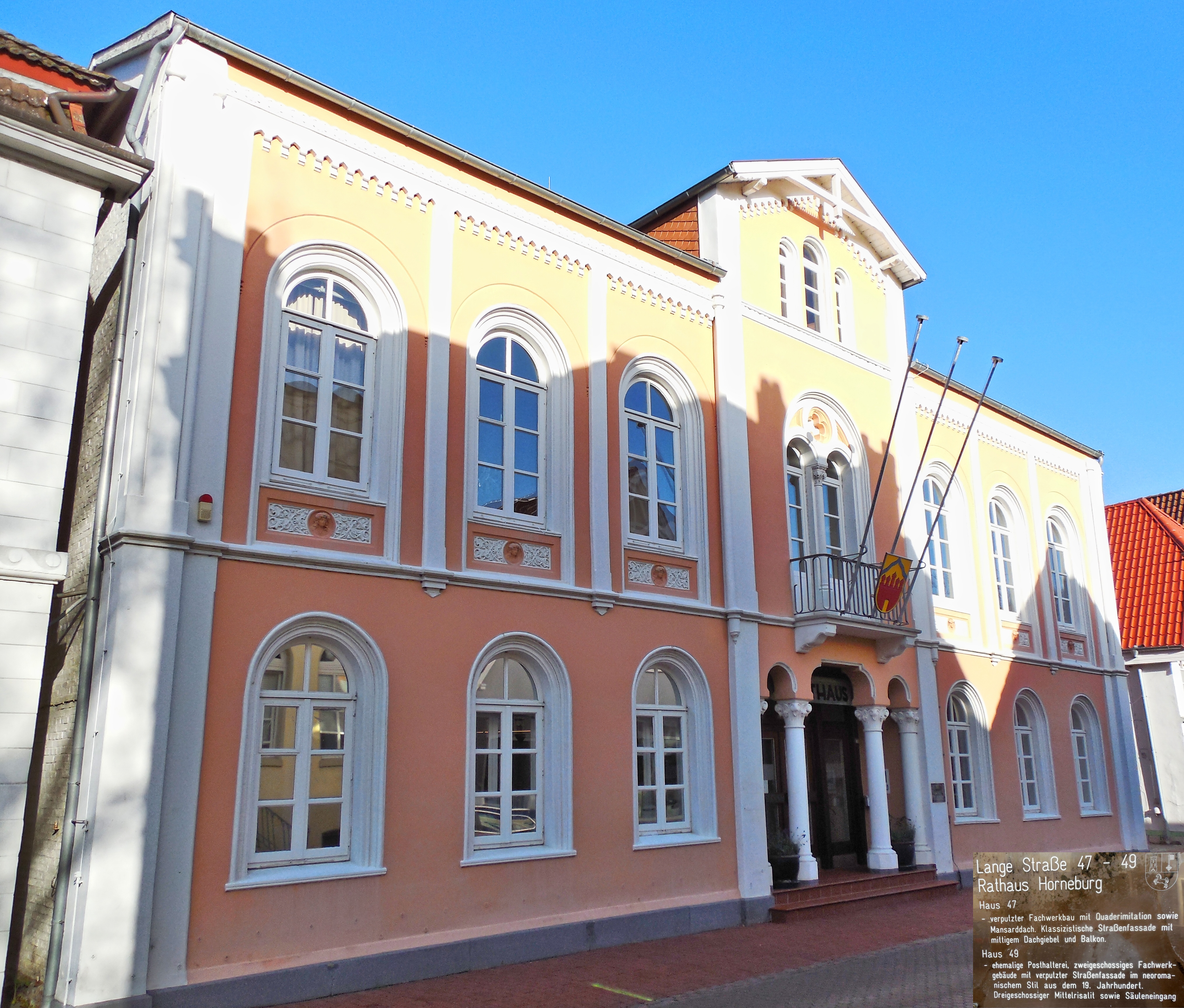 Rathaus